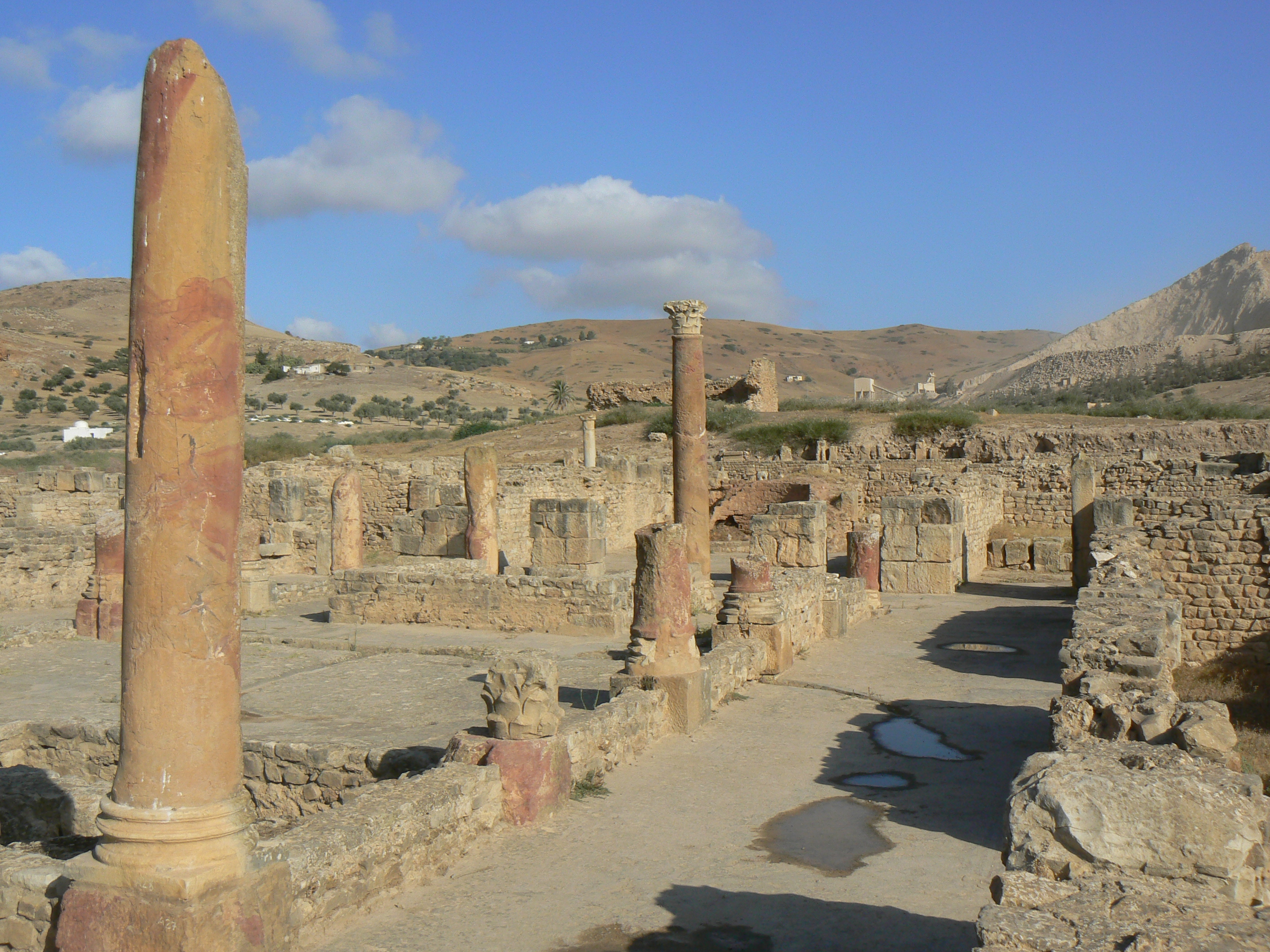 Ilot de la chasse à Bulla Regia